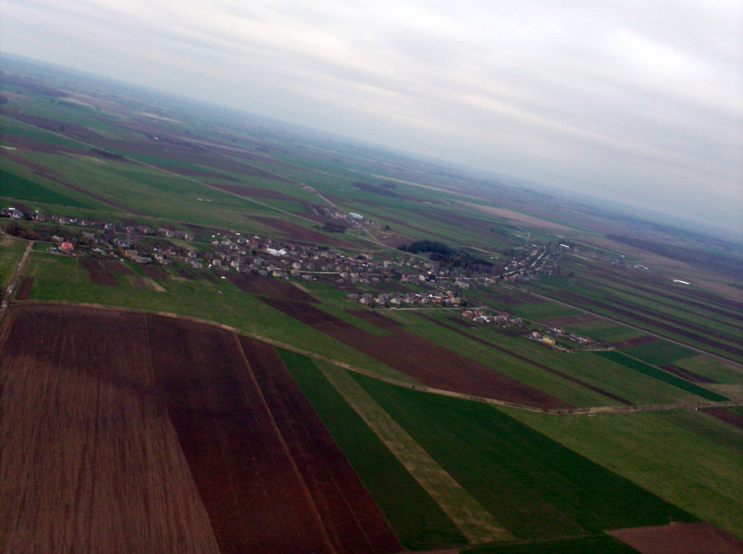 Meškalaukis, Pasvalio raj.